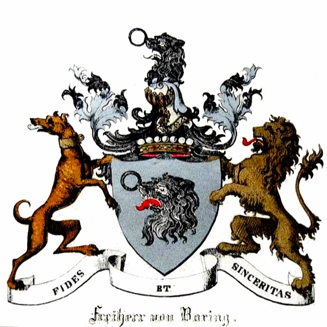 Wappen derer Freiherren von Baring, abstammend von Georg Baring.